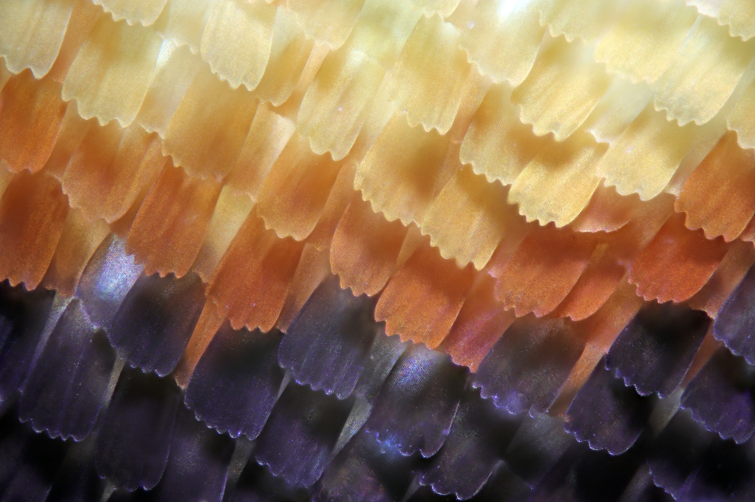 Kleiner Fuchs, Flügelschuppen der Oberseite, mikroskopisch